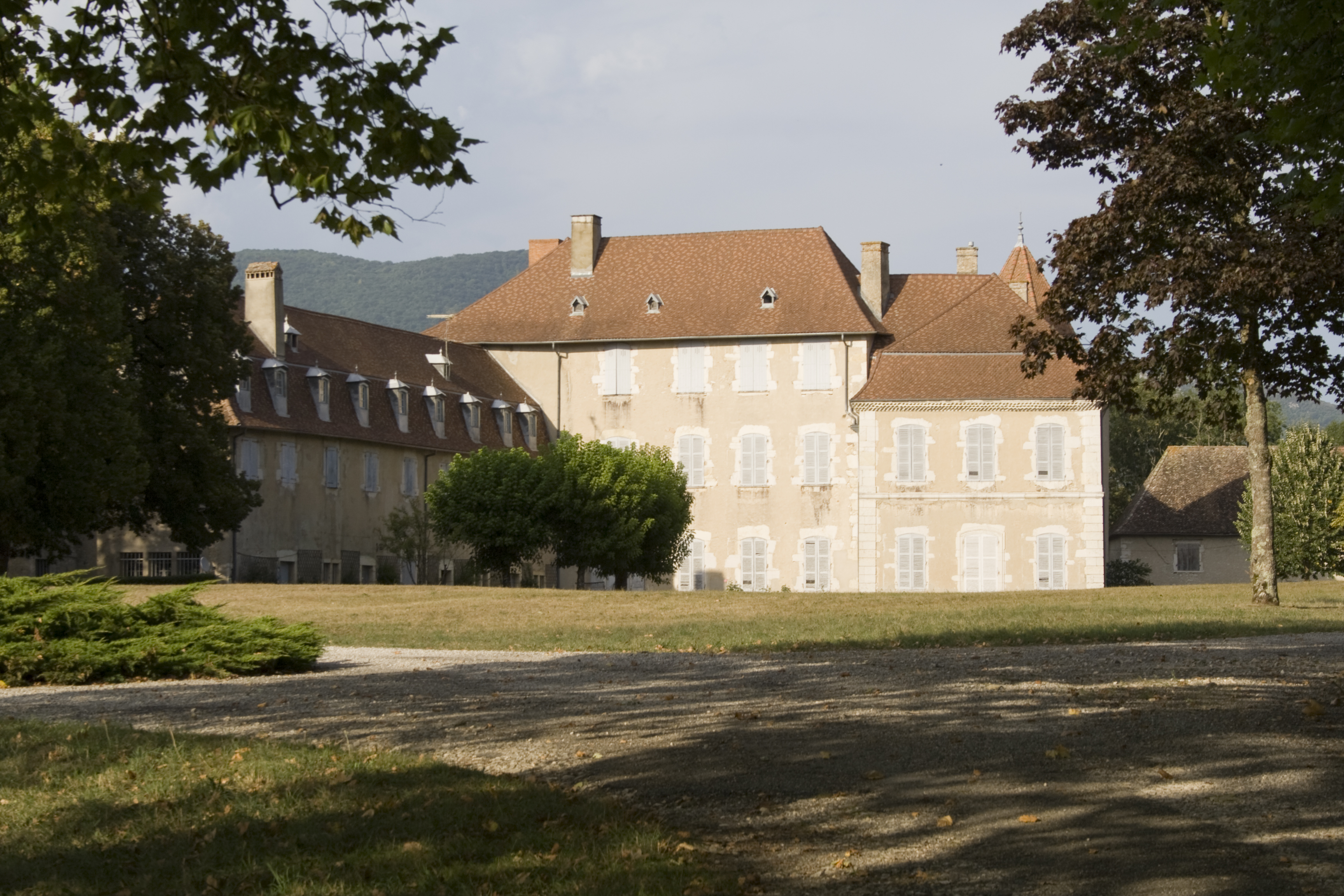 La propriété de Paul Claudel à Brangues près de Morestel (38510)